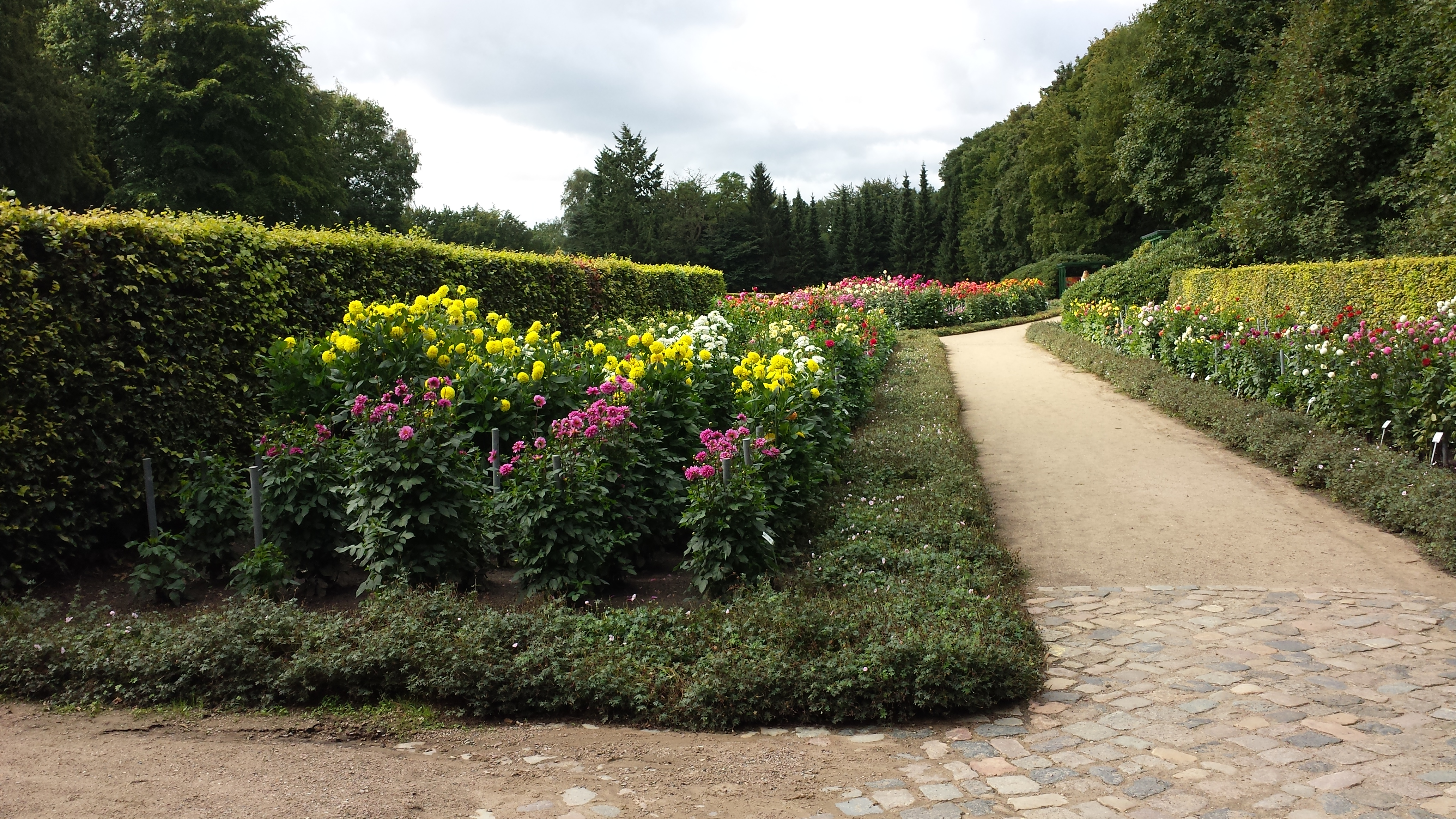 Osteingang des Dahliengartens in Altona